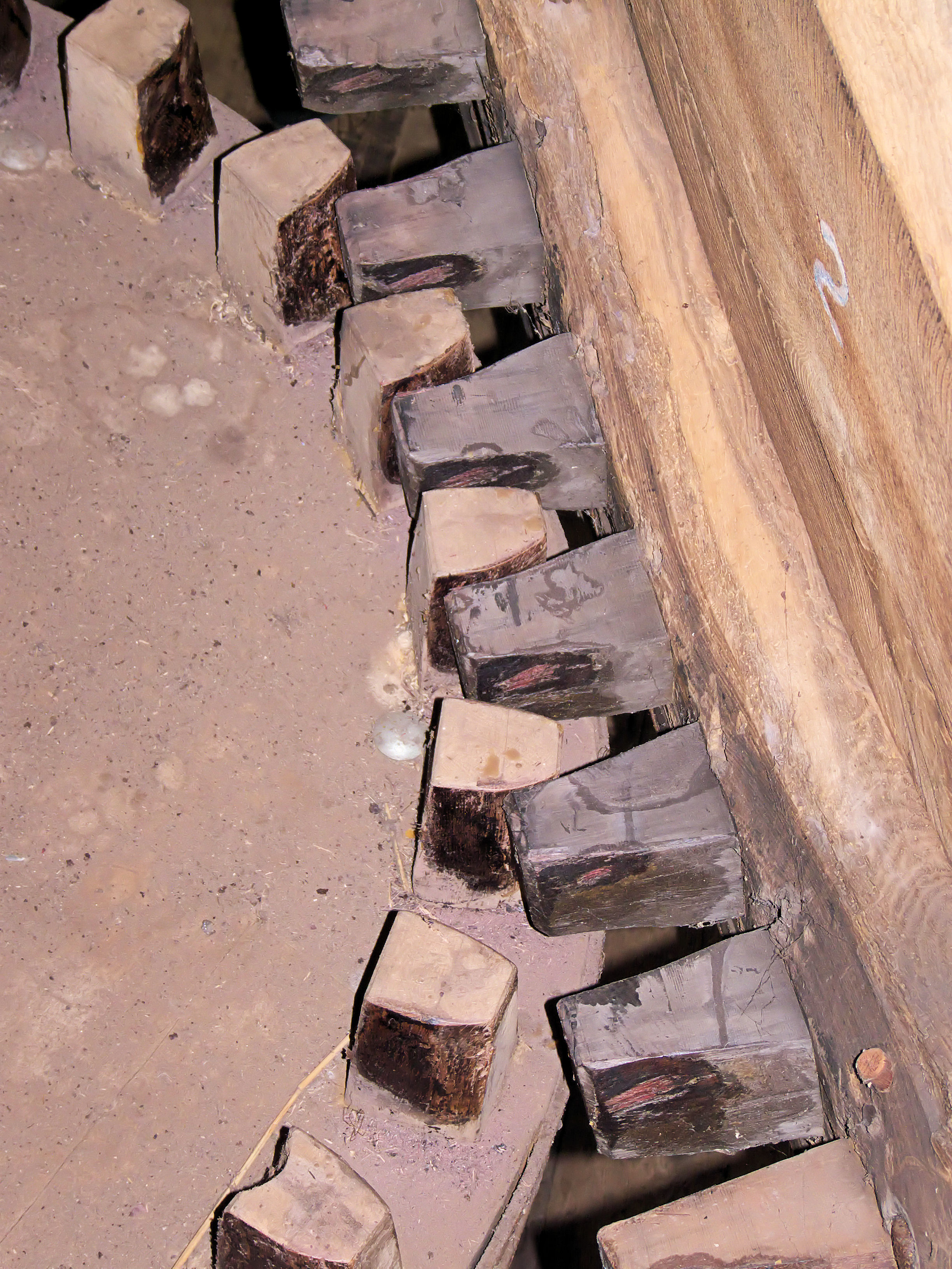 Tweede Broekermolen bovenwiel met bonkelaar